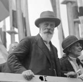 Title: Wien, Tribüne beim Sängerbund-Fest People in the image: Hainisch, Michael Dr.: Bundespräsident, Österreich (GND 118544977) * Seipel, Ignaz Prof. Dr.: Bundeskanzler, katholischer Priester, Prälat, Österreich * Löbe, Paul Dr.: Reichstagspräsident, SPD, MdB, Kuratorium unteilbares Deutschland, Bundesrepublik Deutschland Factual corrections and alternative descriptions are encouraged separately from the original description. Additionally errors can be reported at this page to inform the Bundesarchiv. Original historic description: Der Riesenfestzug des 10. deutschen Sängerbund-Festes in Wien. 200.000 deutsche Sänger zogen durch die Strassen Wiens. Aufnahmen unseres nach Wien entsandten Sonder-Bild-Berichterstatters! Die Tribüne mit den Ehrengästen: I. der österreichische Bundespräsident Dr. Hainisch, II. der österreichische Ministerpräsident Seipel, III. der deutsche Reichstagspräsident Löbe, während des Festzuges.